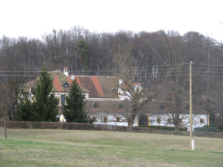 Dvorac Miljana